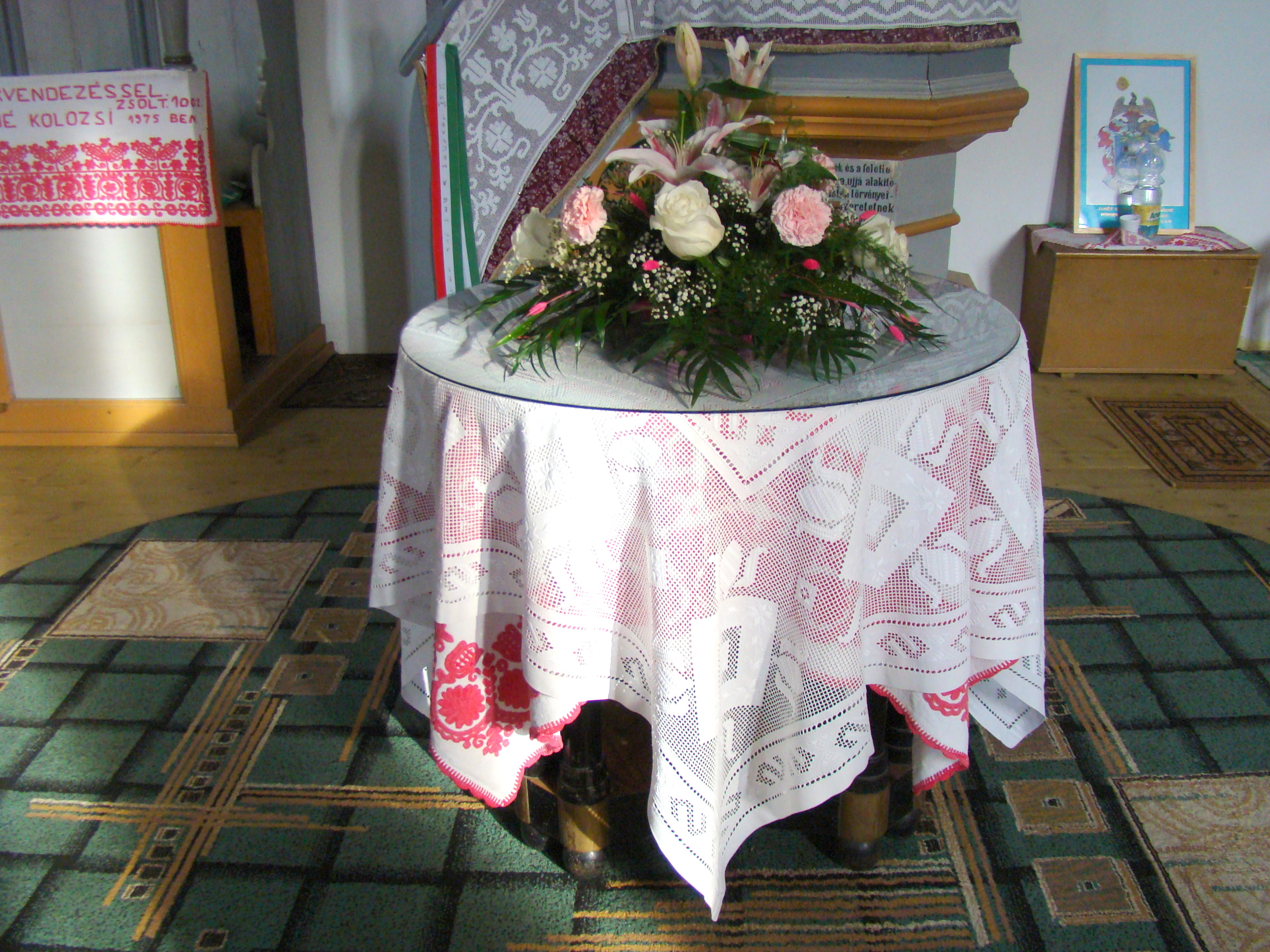 Biserica reformată din satul Tetișu; comuna Fildu de Jos, județul Sălaj